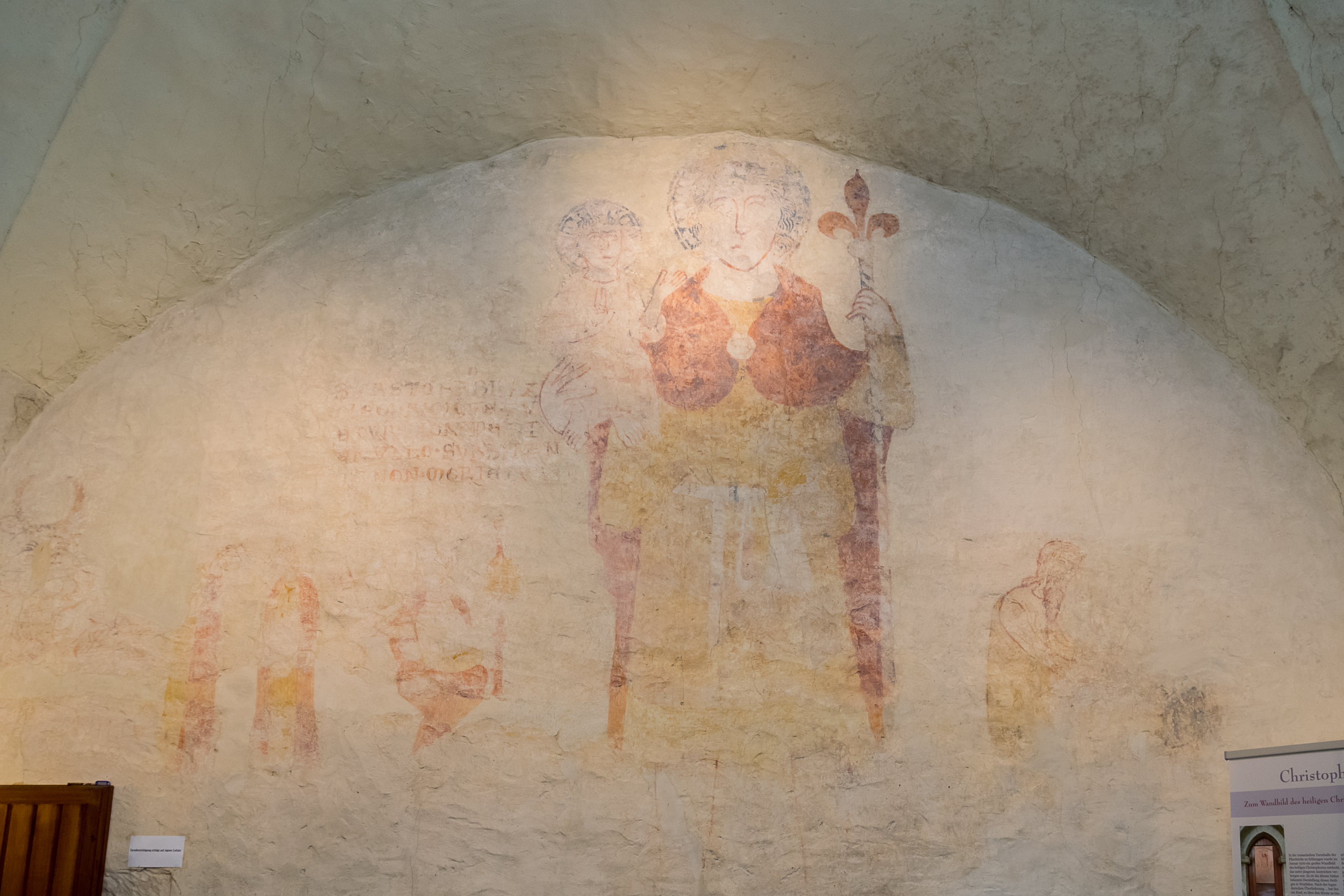 mittelalterliche Christophorus-Darstellung im Turm der ev.-ref. Kirche Schlangen